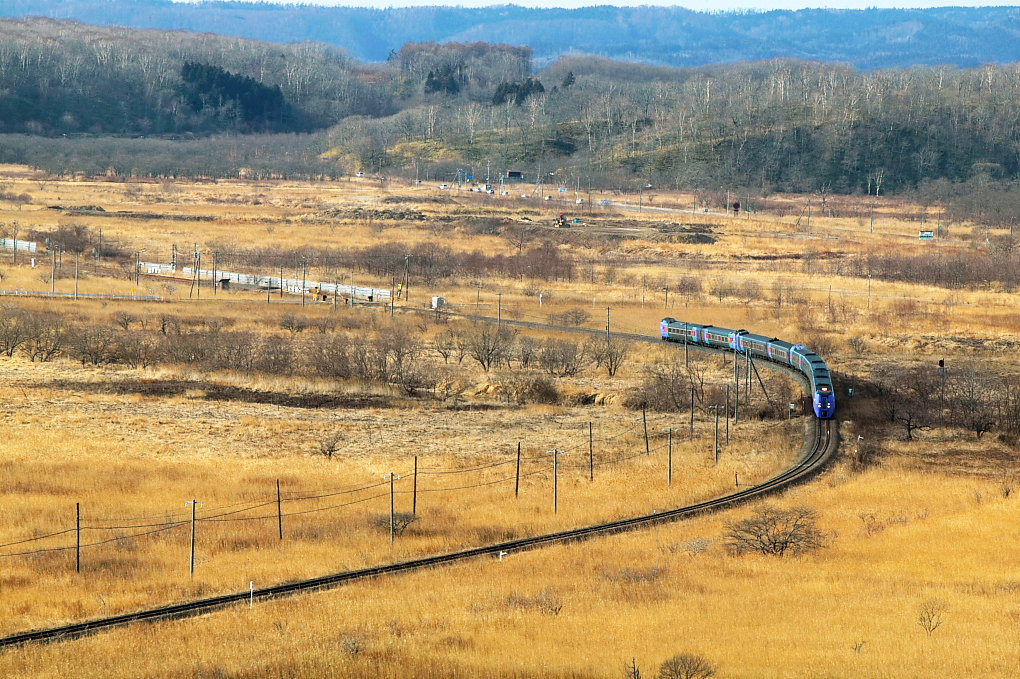 JR Hokkaido Nemuro Main Line, between Shakubetsu and Ombetsu.